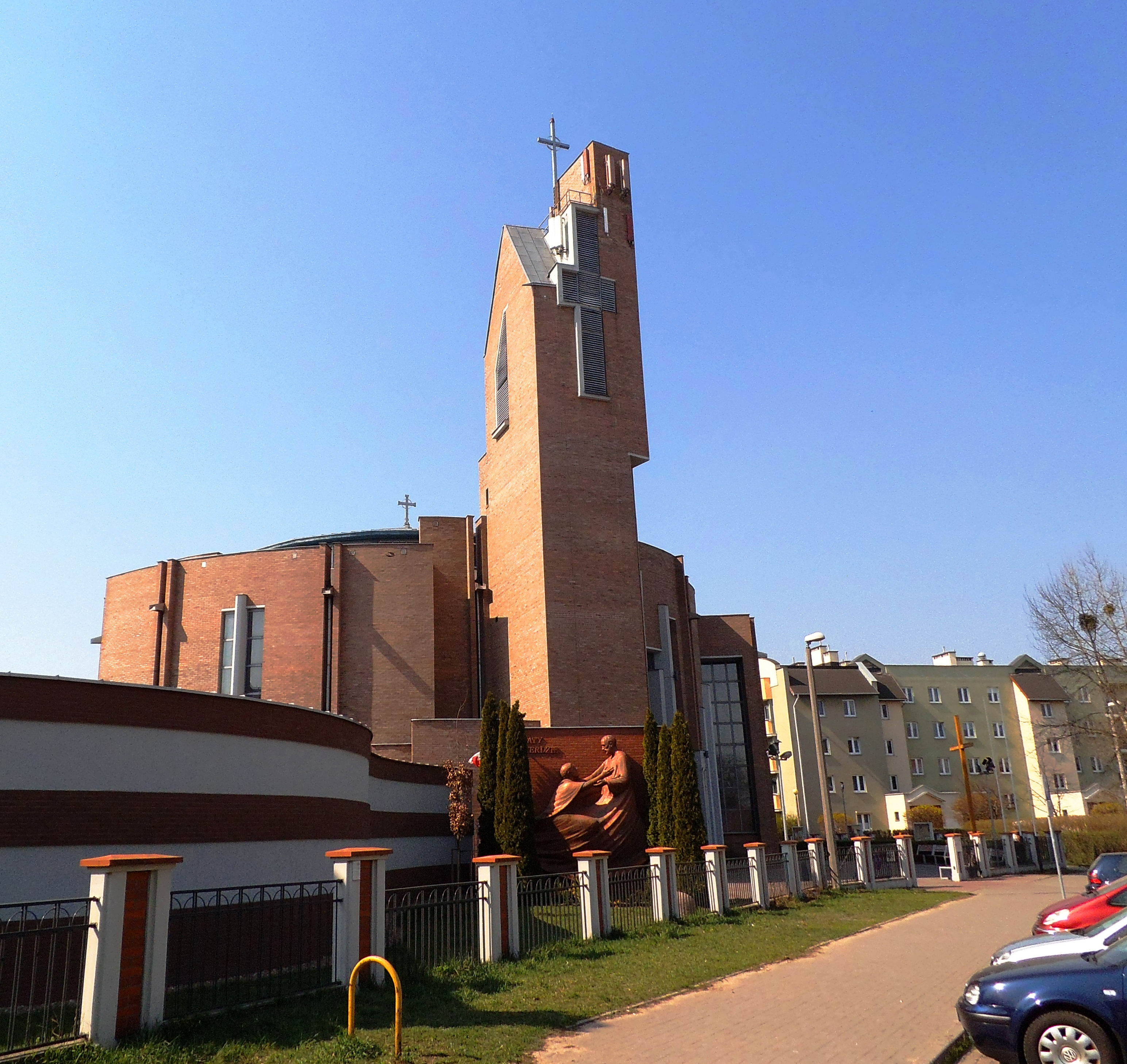 Kościół Miłosierdzia Bożego i św. Faustyny Kowalskiej w Toruniu